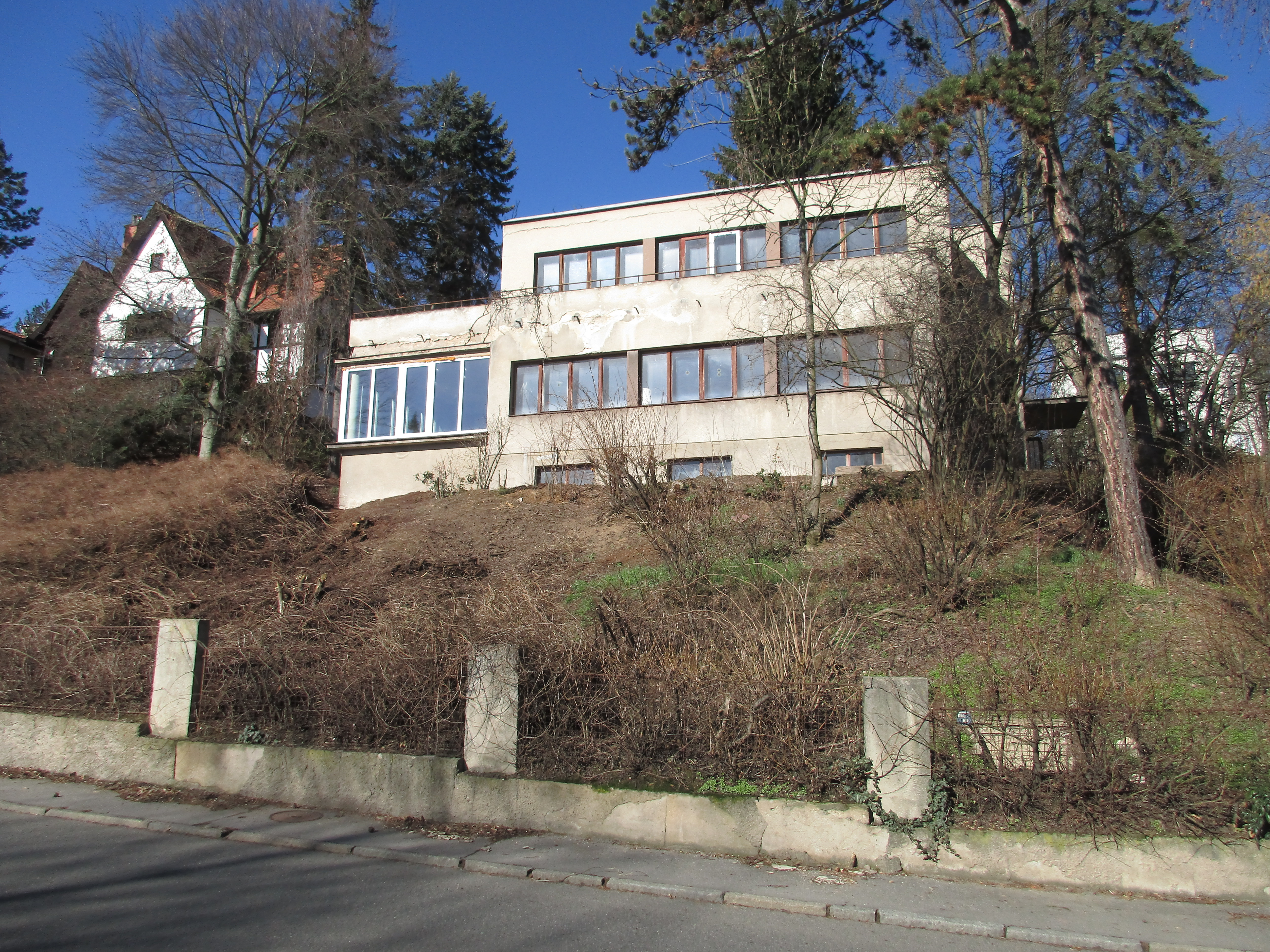 Barrandovská 177/16, Praha 5-Hlubočepy. Dům Viléma Stanovského, generála letectva. Arch. Vladimír Grégr, 1930-1932.